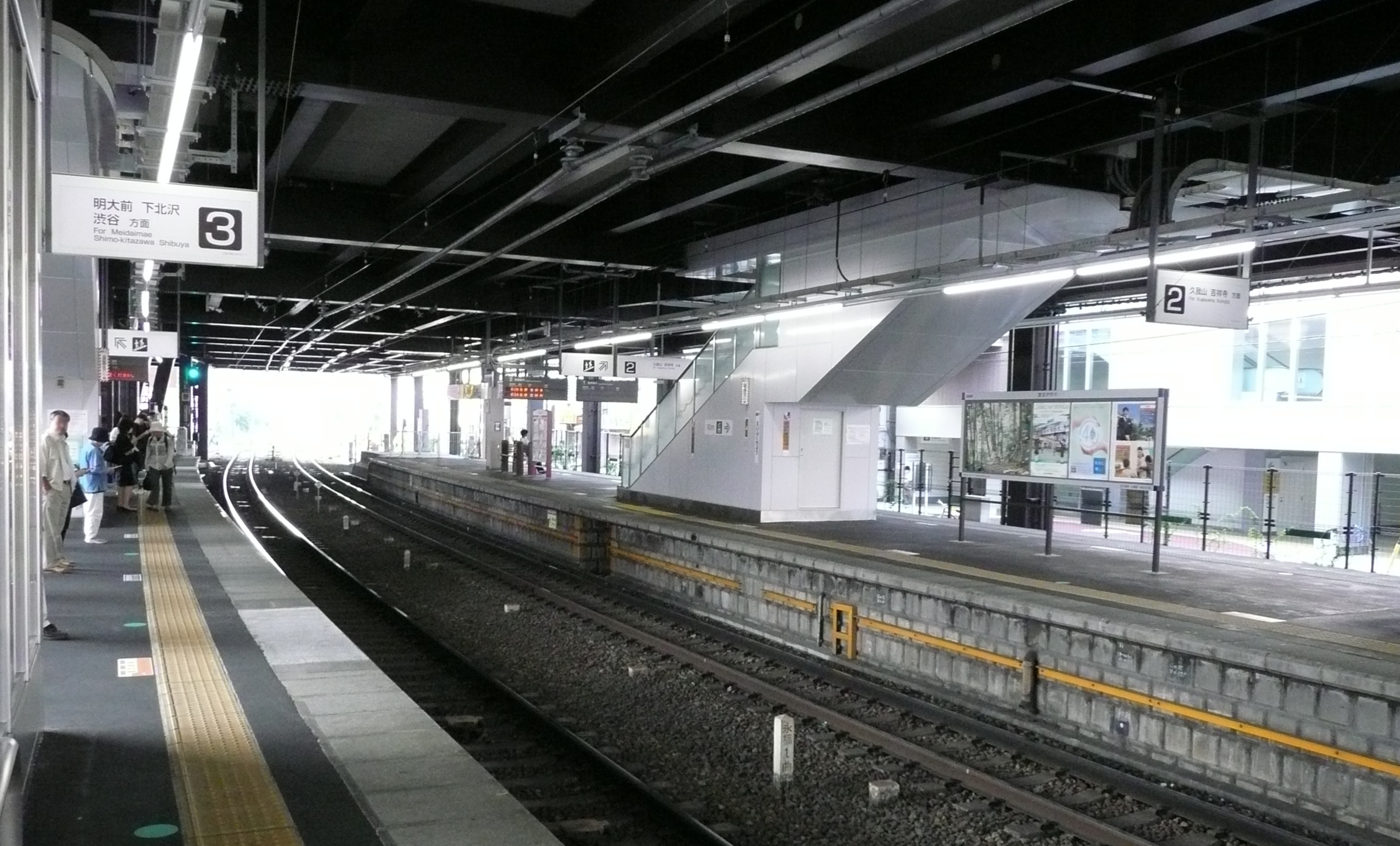 永福町駅ホーム